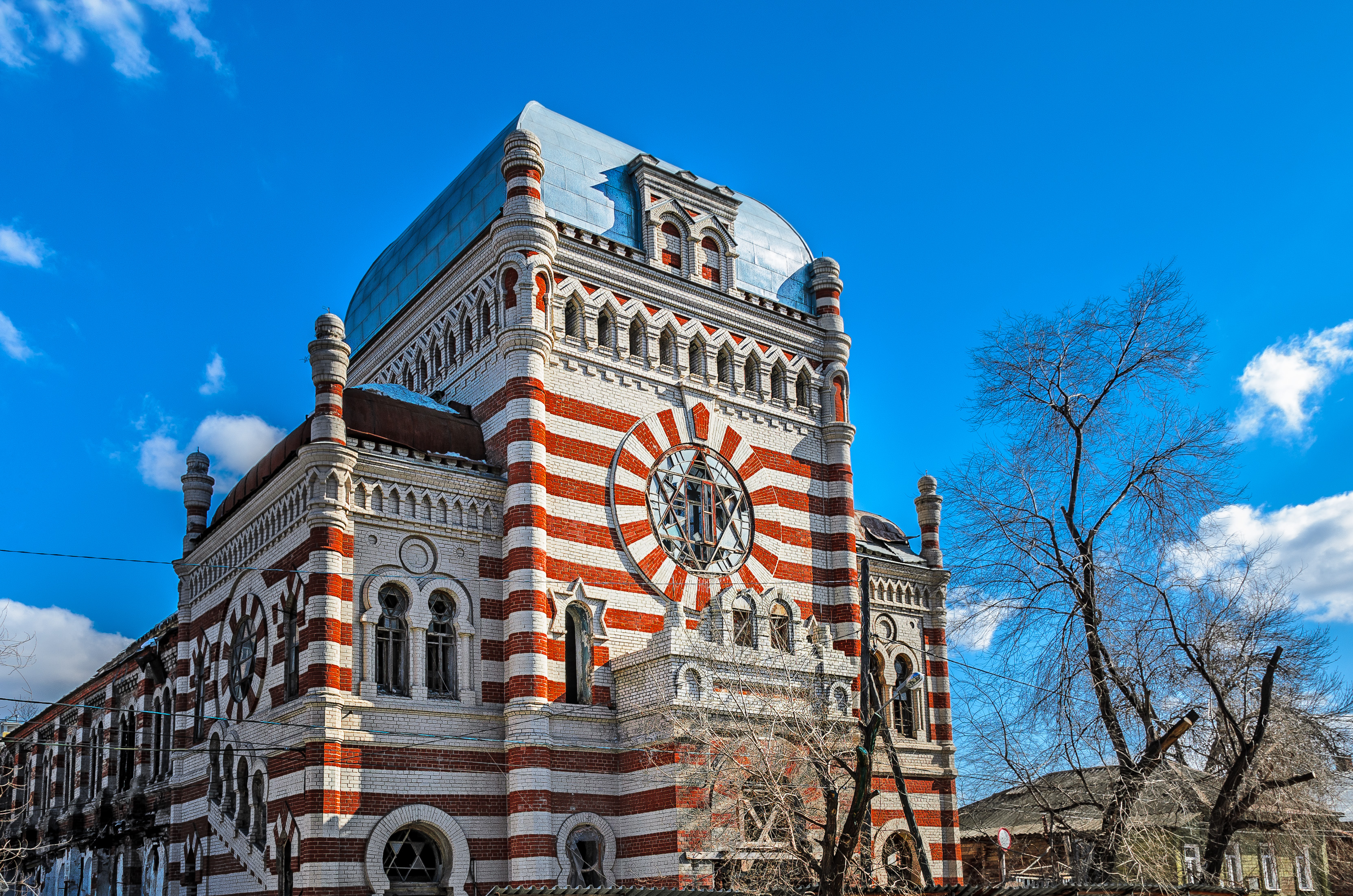 Синагога: улица Садовая, 49, Самара, Самарская область